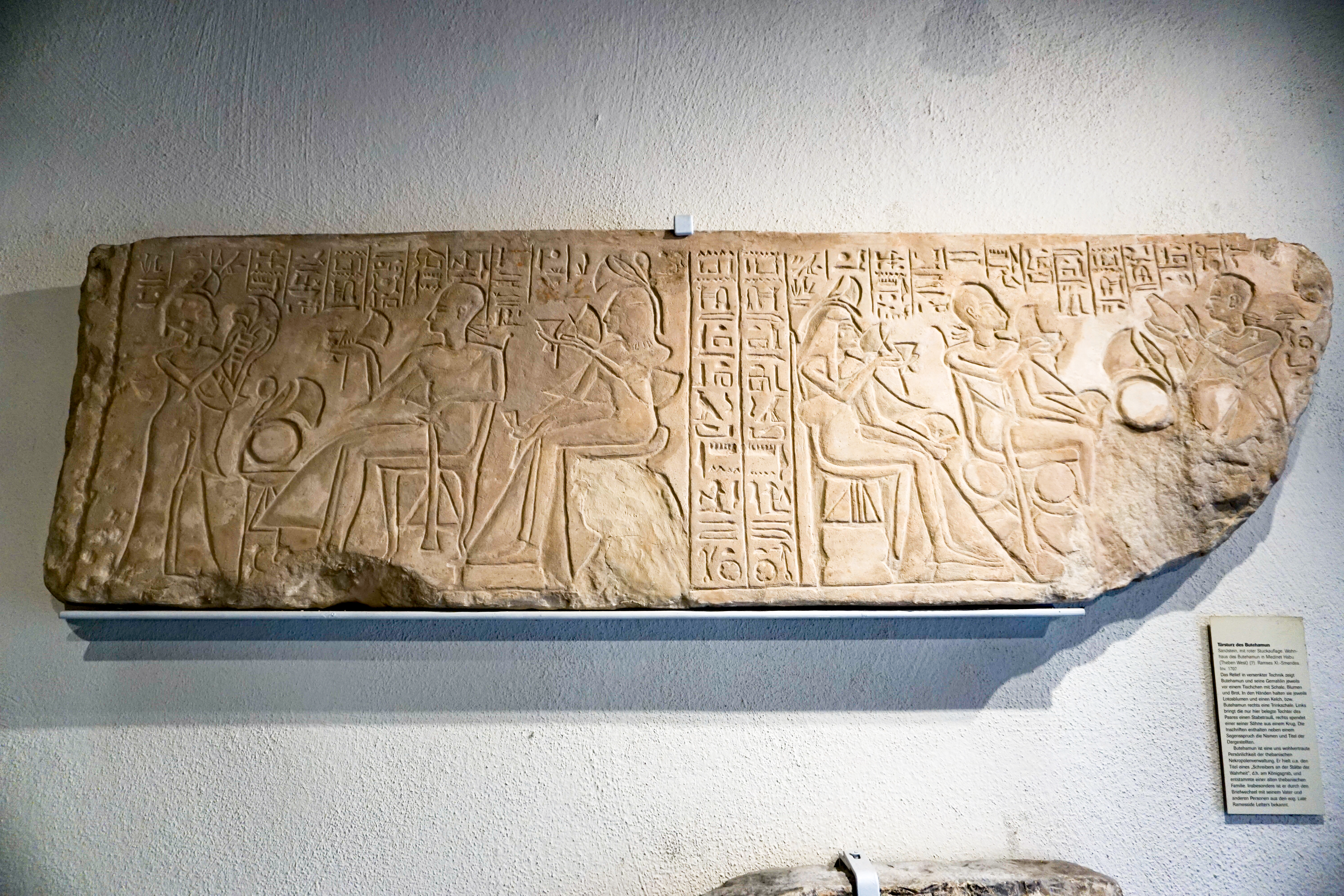 MUT: Museum der Universität Tübingen - Alte Kulturen - Sammlungen im Schloss Hohentübingen, Ägyptische Sammlungen: Türsturz des Butehamun. Sandstein, mit roter Stuckauflage. Wohnhaus des Butehamun in Medinet Habu, Ramses XI, Inv. 1707